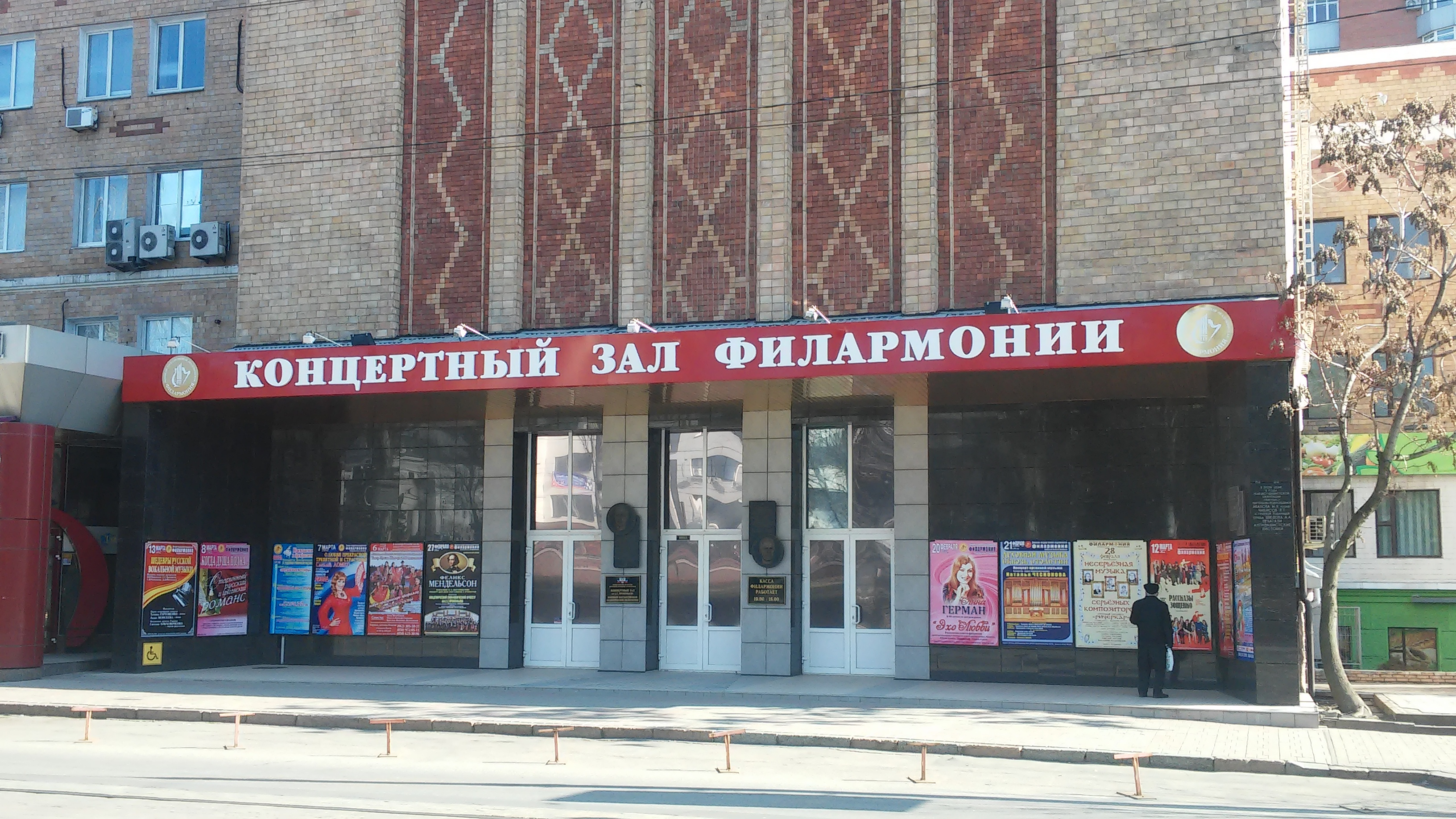 Донецкая филармония Донецк, ул. Постышева, 117